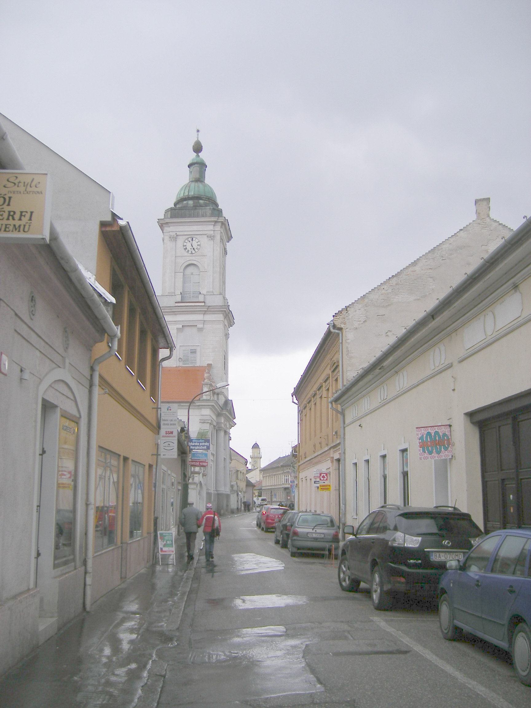 Komárom - a Jókai utca északi irányból a református templommal